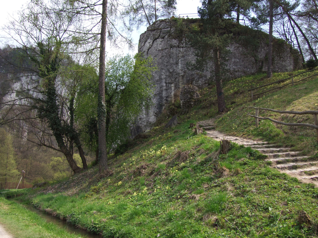 Skała Jonaszówka (Ojcowski Park Narodowy)